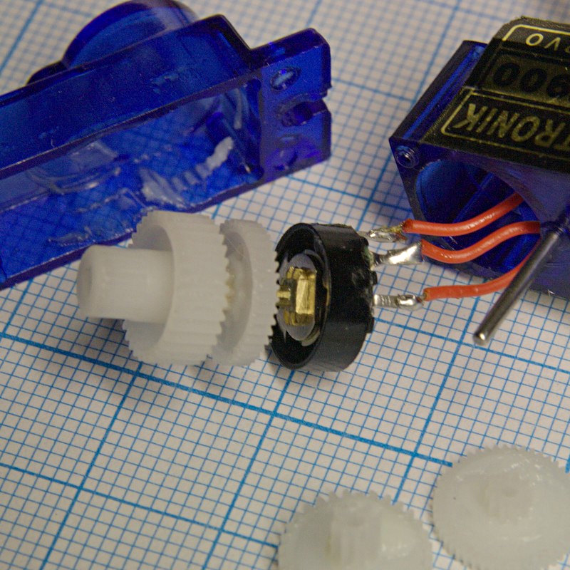 uk у сервомашинці